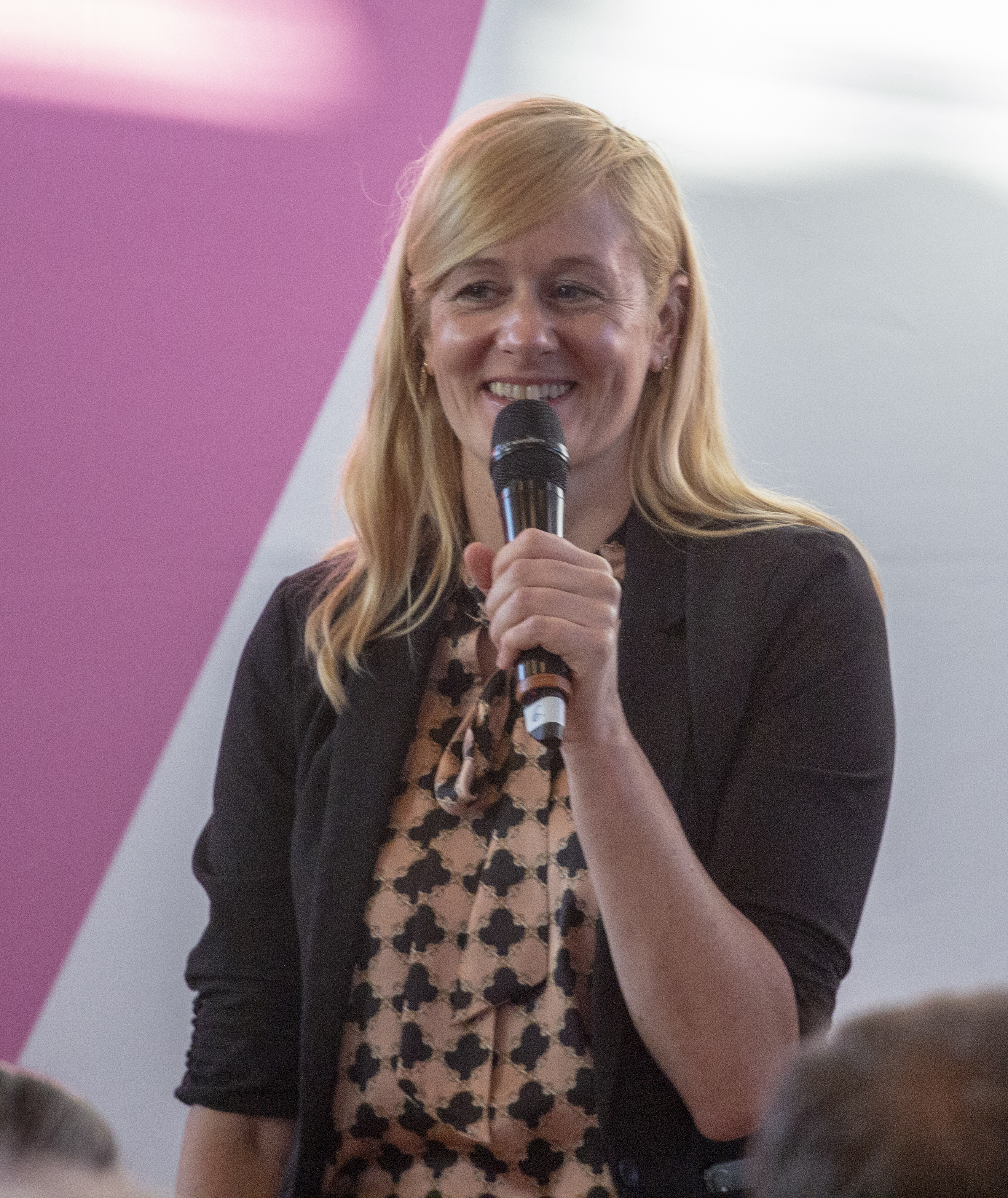 Christina Kampmann bei der SPD Regionalkonferenz zur Wahl des SPD-Vorsitzes am 10. September 2019 in Nieder-Olm. SPD Regionalkonferenz in Nieder-Olm